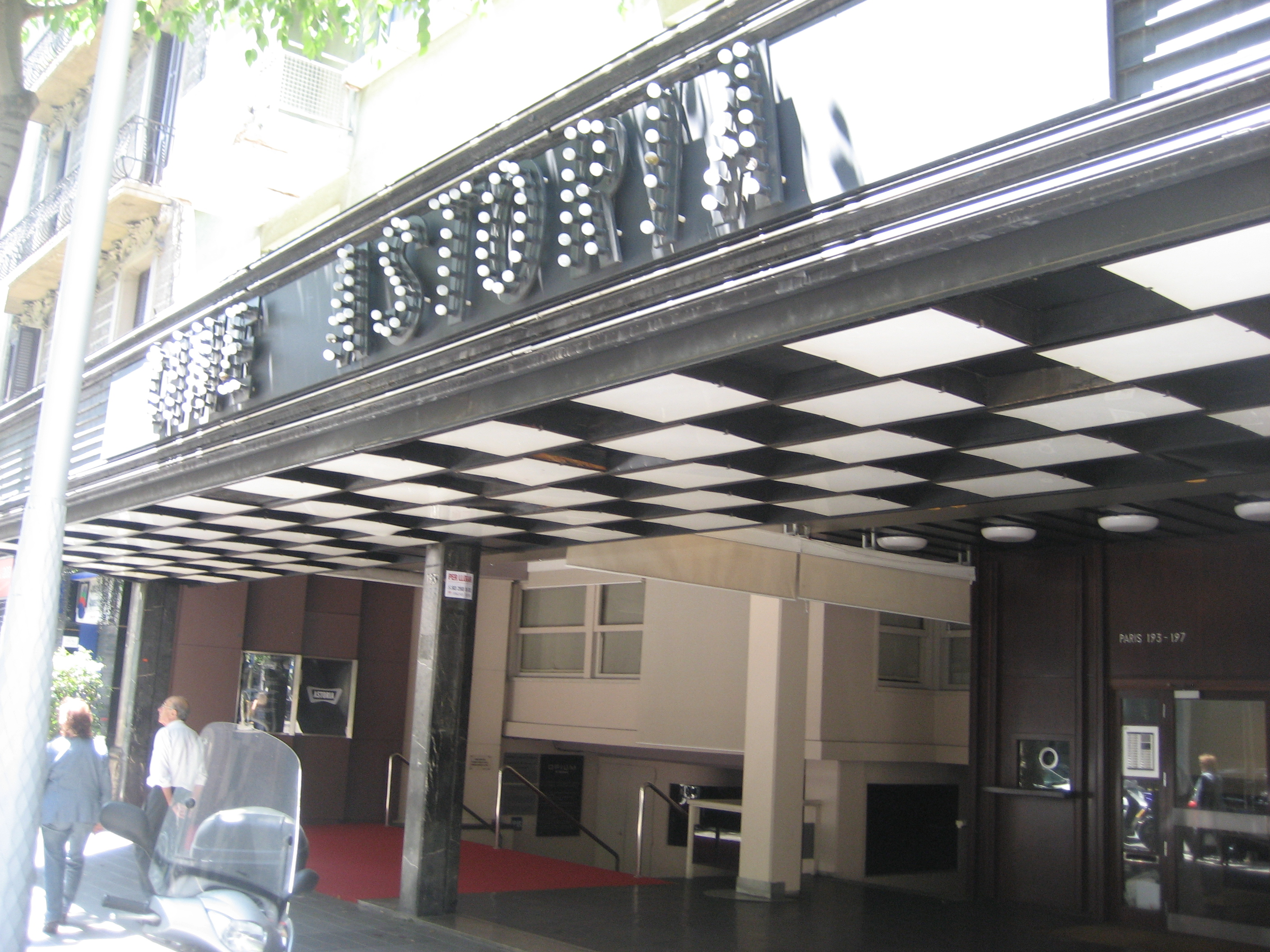 Façana del Cinema Astoria de Barcelona (maig 2010)